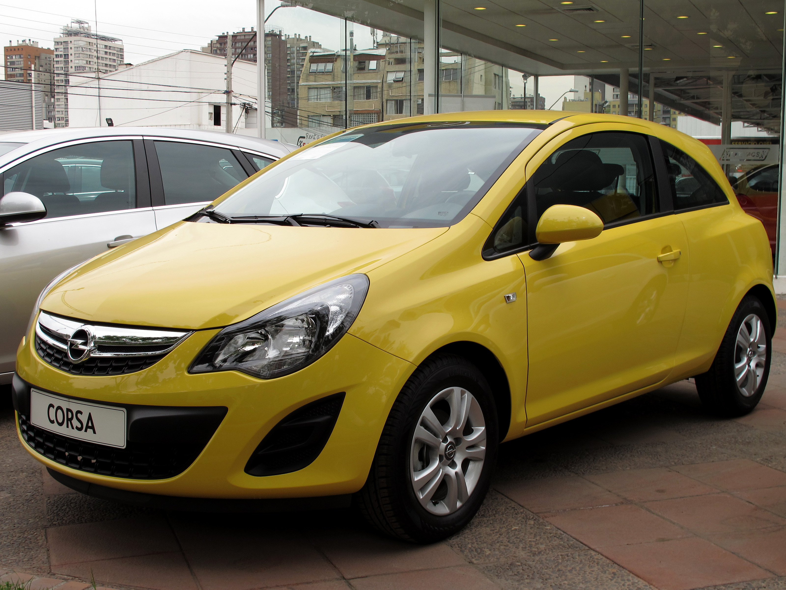 Opel Corsa 1.4 Enjoy 2014